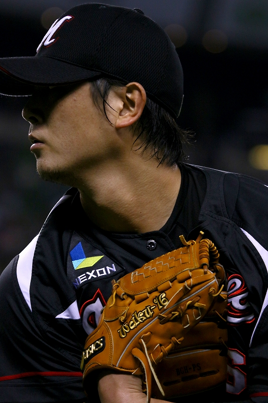 2014日本プロ野球 千葉ロッテマリーンズ 涌井秀章投手 背番号16